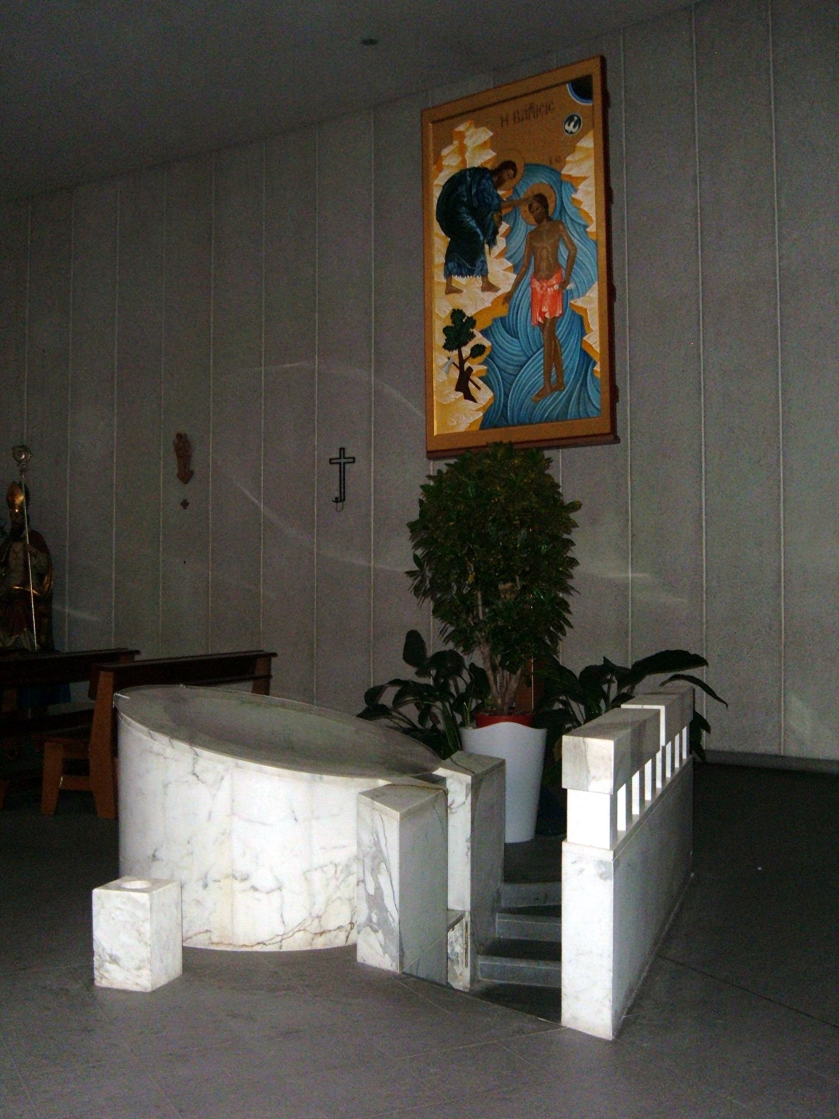 Chiesa parrocchiale di San Clemente, a Roma, nel quartiere Monte Sacro, in via Val Santerno. Battistero.